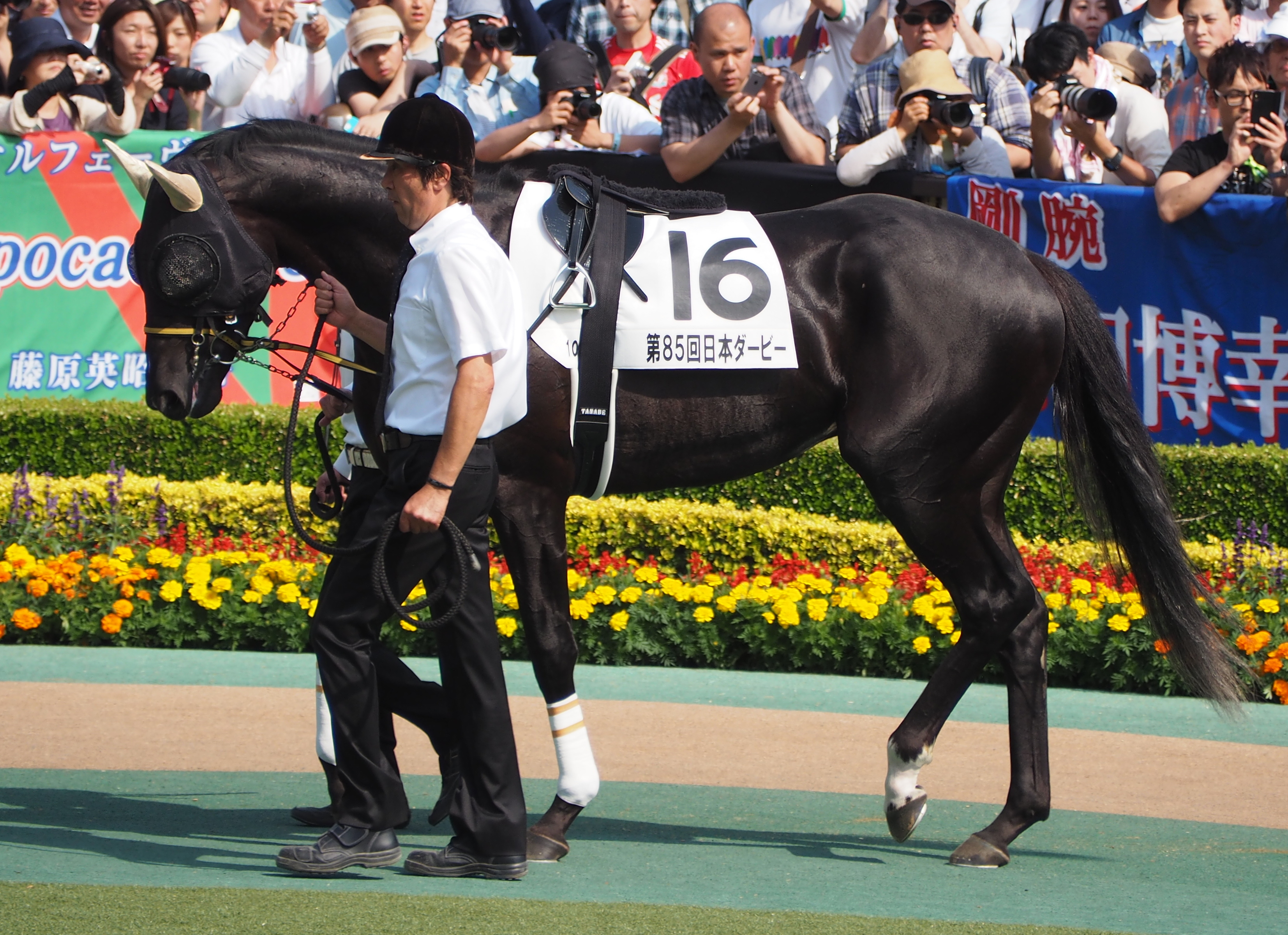 10R 東京優駿 日本ダービー